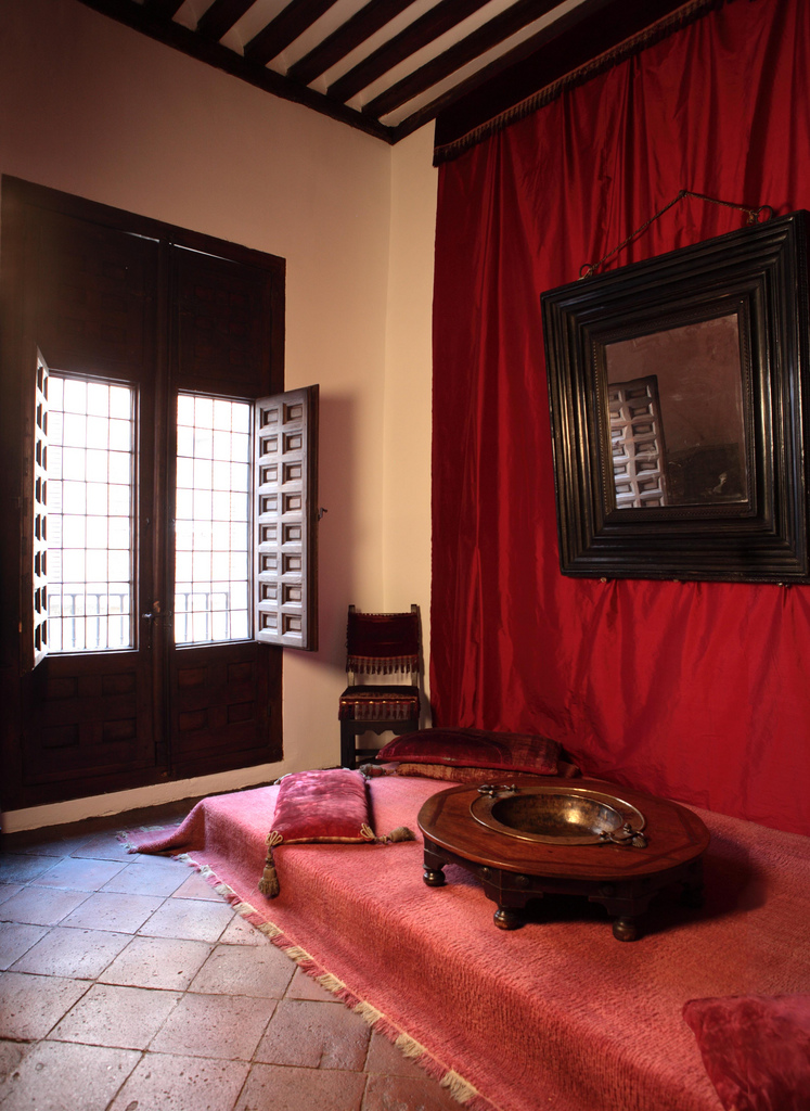 Estrado en la Casa Museo de Lope de Vega, en Madrid (España).